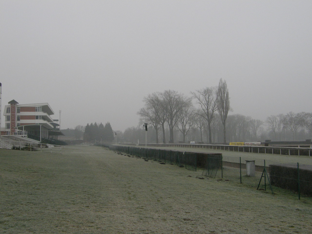 Tereny wyścigów konnych - Pardubice